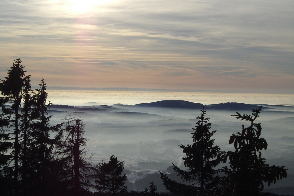 Neureichenau